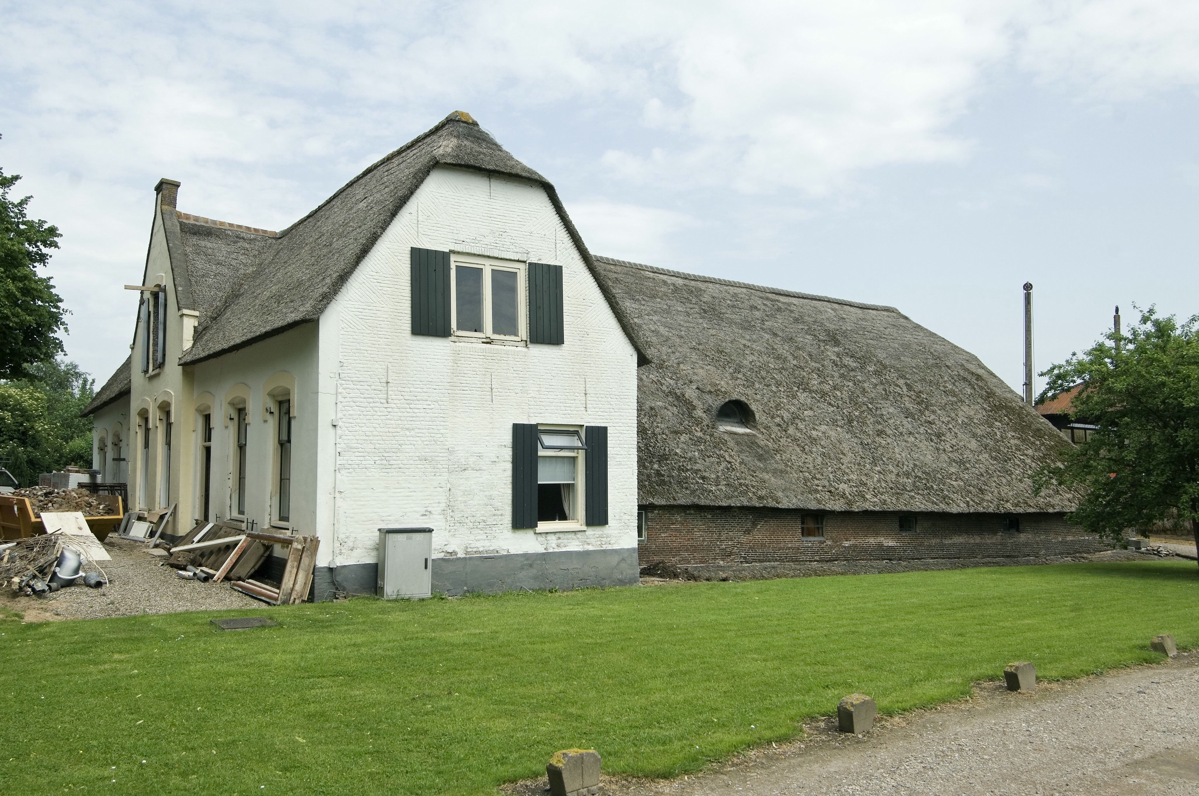 Boerderij Maire Hofstede: Overzicht van de zijgevel met rechts de schuur er tegen aan (opmerking: Project RRWR)